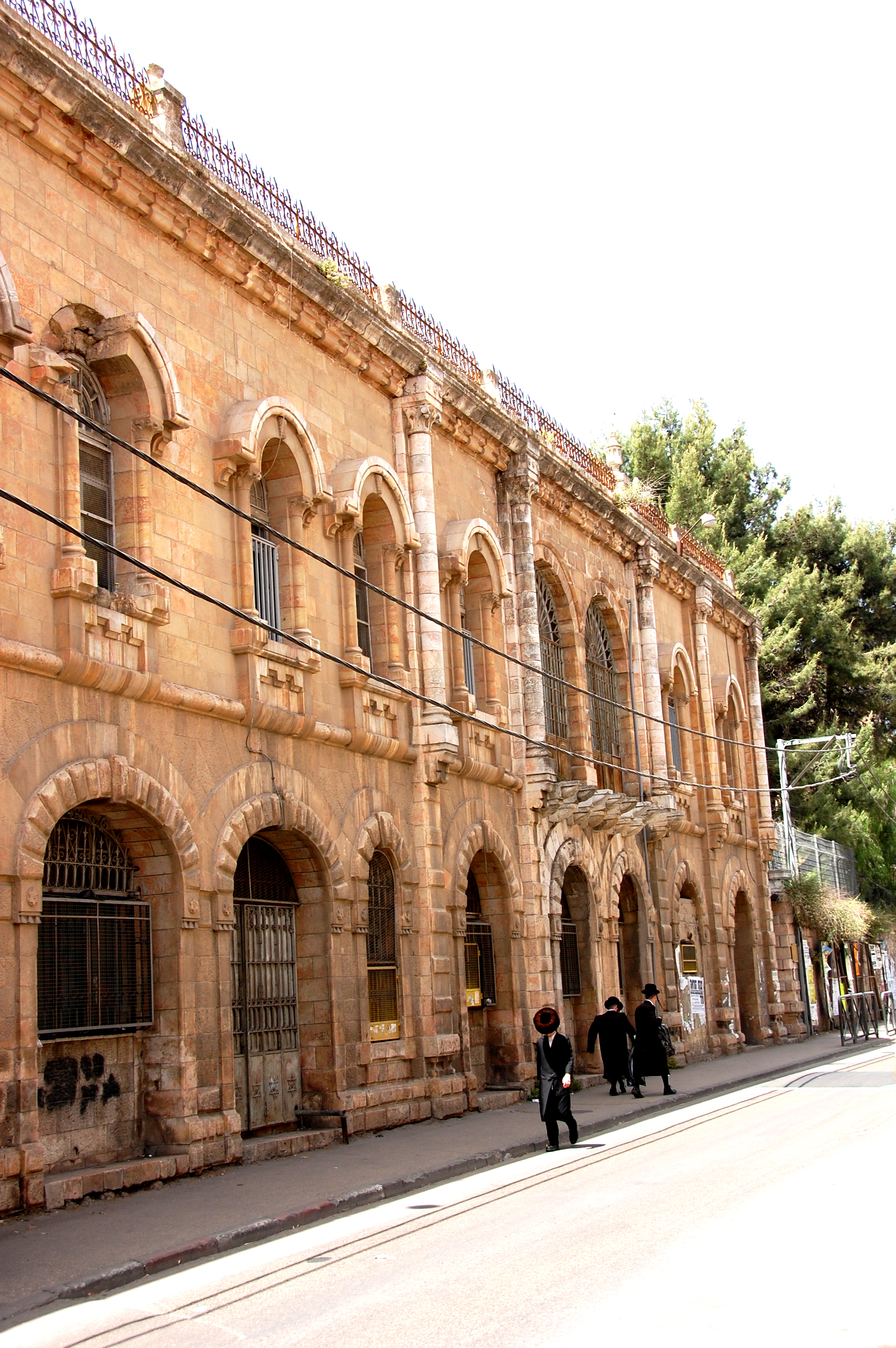 בית יהודיוף-חפץ, שכונת הבוכרים